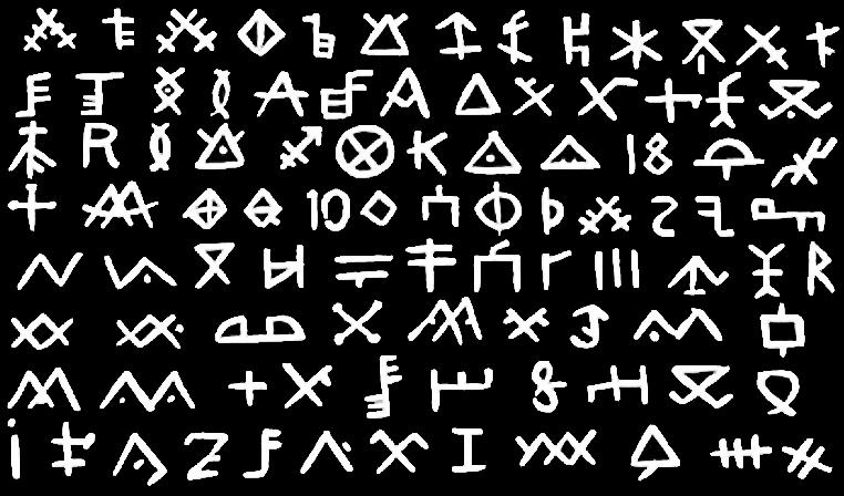 Valik Saaremaa talude peremärke.